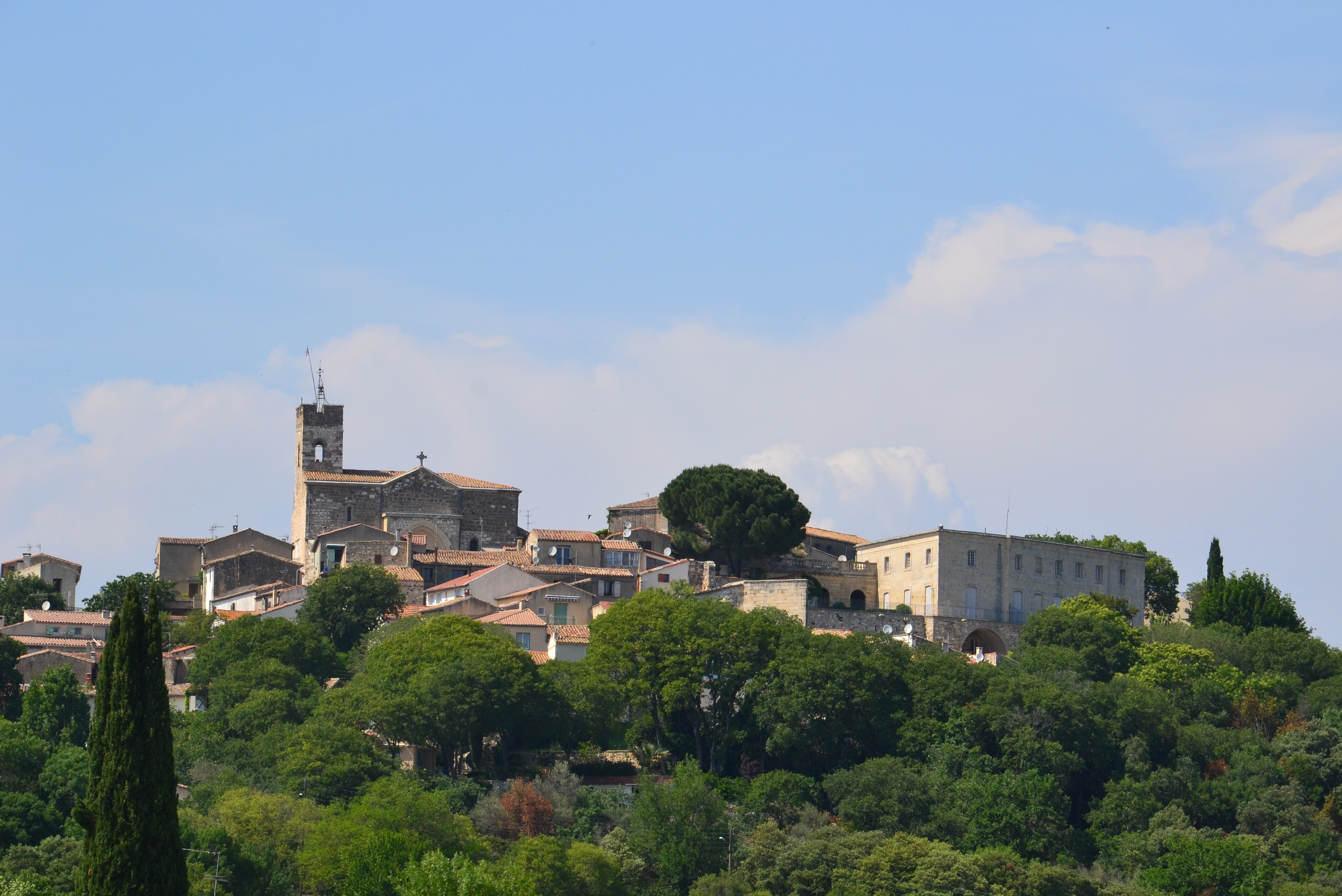 Le vieux village de Montferrier-sur-Lez.